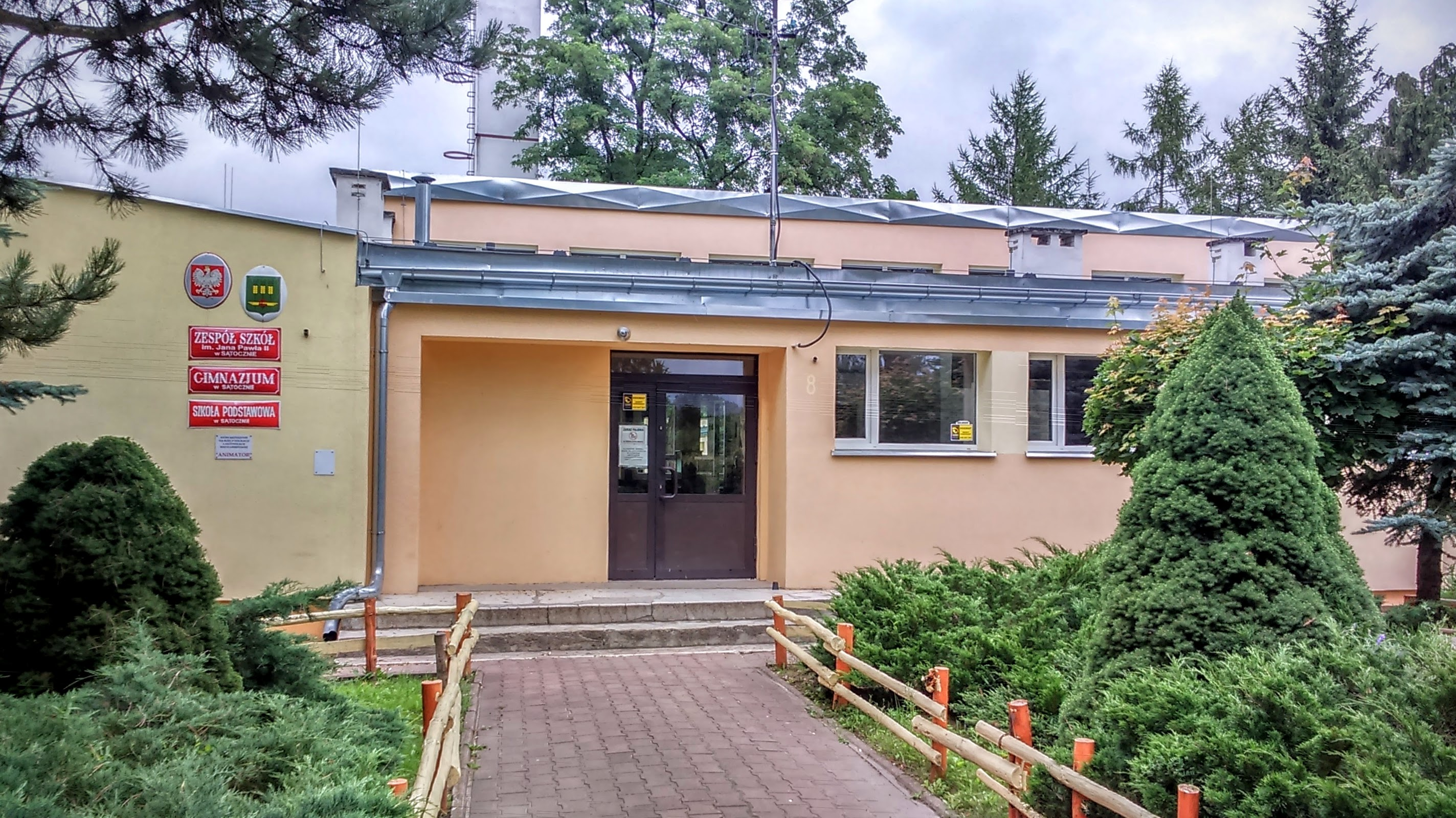 Zespół Szkół w Sątocznie_od frontu